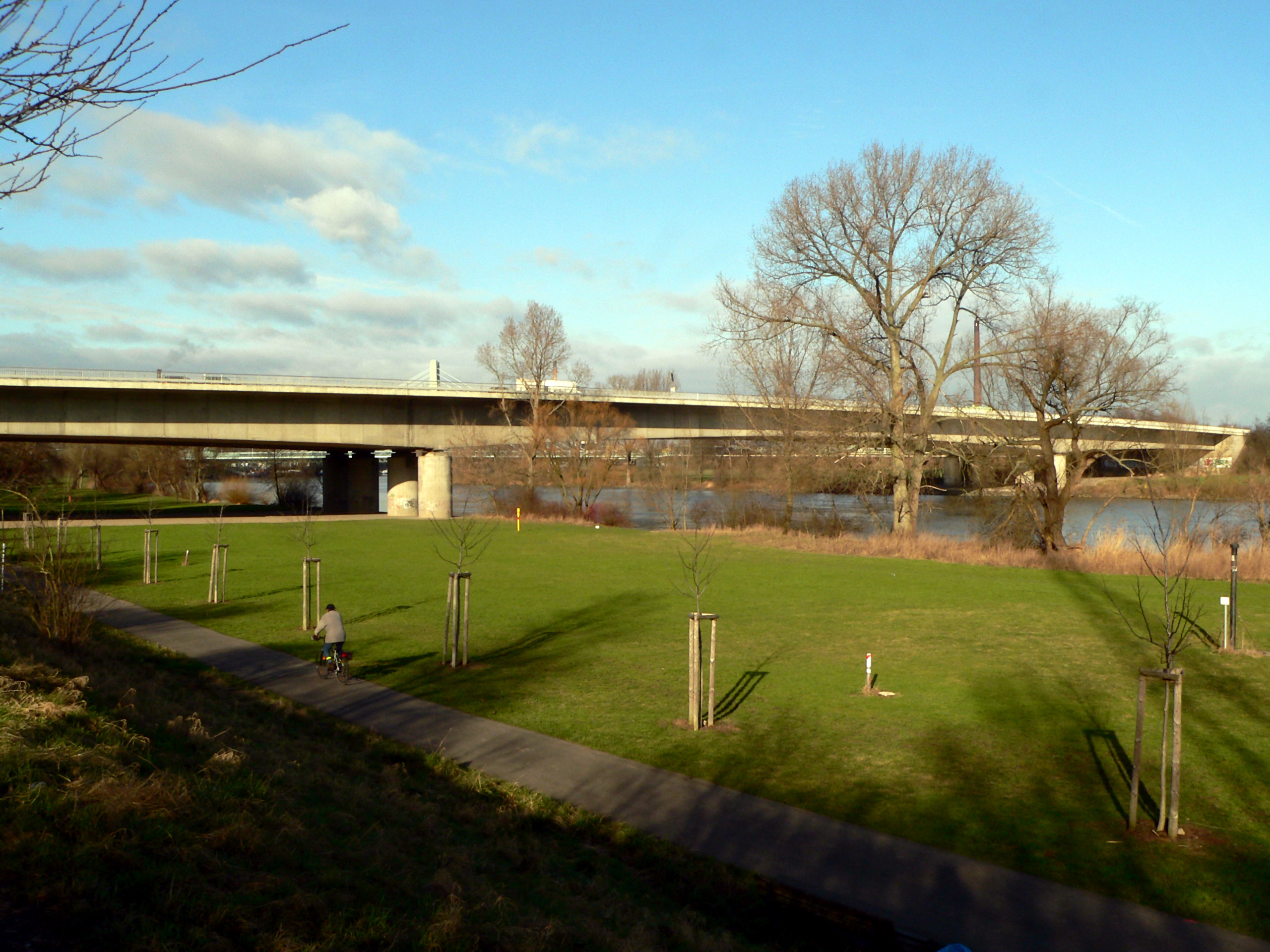 Sindlinger Mainaue mit der Sindlinger Mainbrücke im Hintergrund